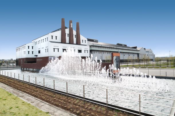 霧島酒造本社増設工場